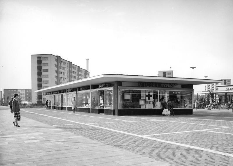 Oktober 1960 Bremen-Vahr Sozialer Wohnungsbau